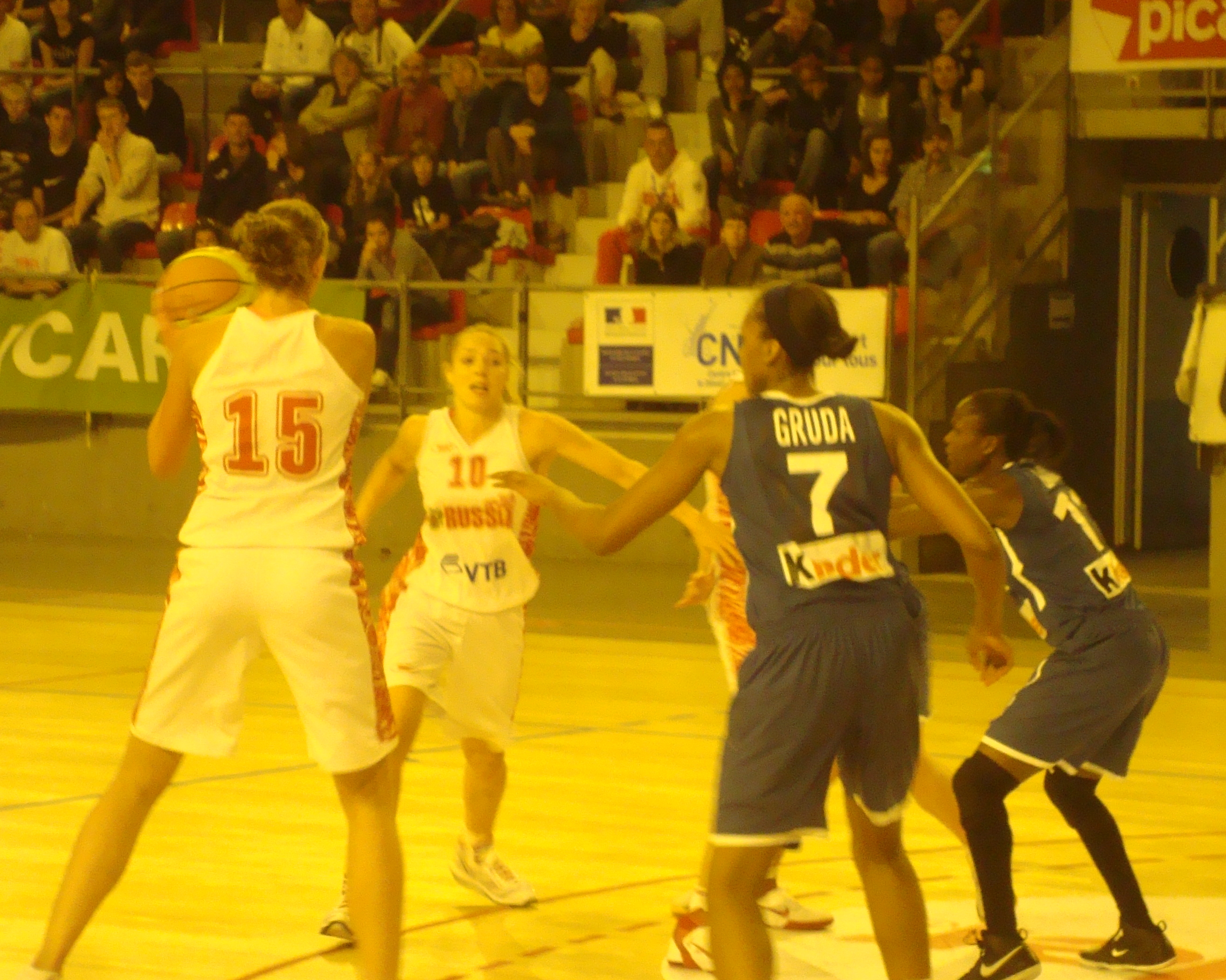 Les basketteuses russes Tatiana Vidmer (15), Ilona Korstine (10) et françaises Sandrine Gruda (7) et Emilie Gomis (11).